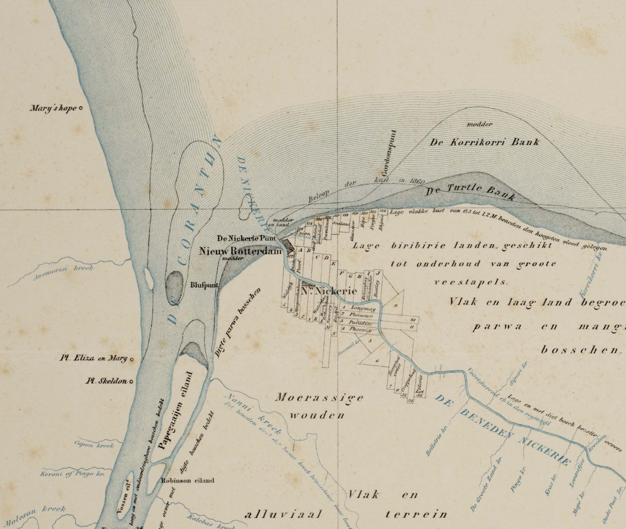 Karte von Suriname, Kartenausschnitt